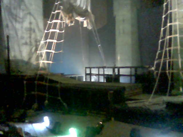 Kościół Św. Jana w Gdańsku. Sceneria spektaklu Otello, X Festiwal Szekspirowski.